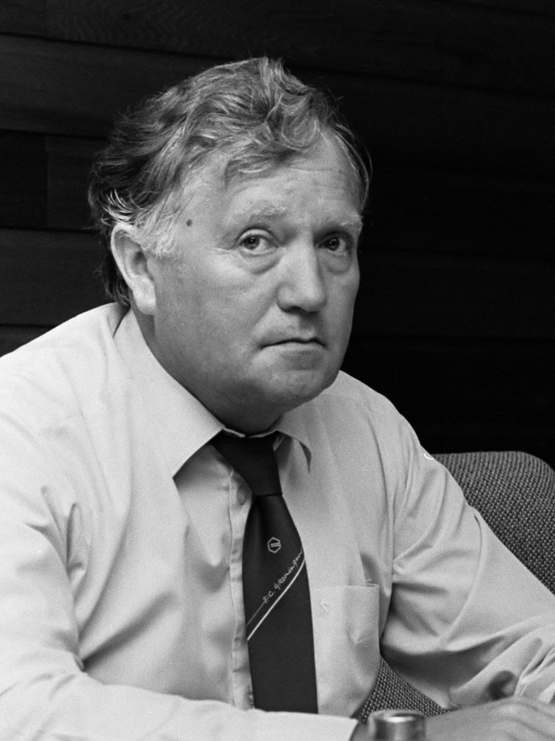 Technische commissie KNVB vergadert in Zeist; v.l.n.r. Renze de Vries , Jo van Marle , Van Eijk en Kastermans 4 september 1984